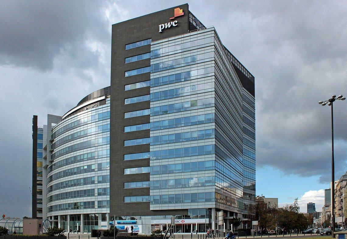 Biurowiec PwC Polska Sp. z o.o. w Warszawie.